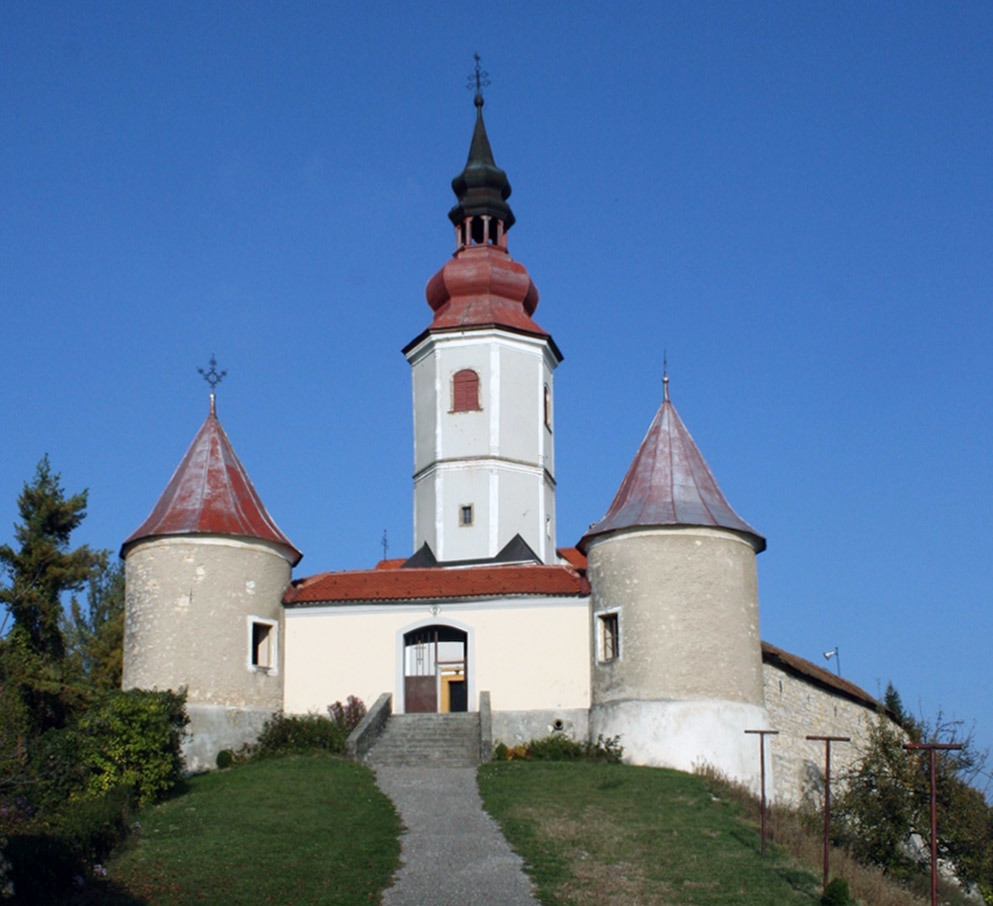 Crkva Marije od pohoda, Vinagora